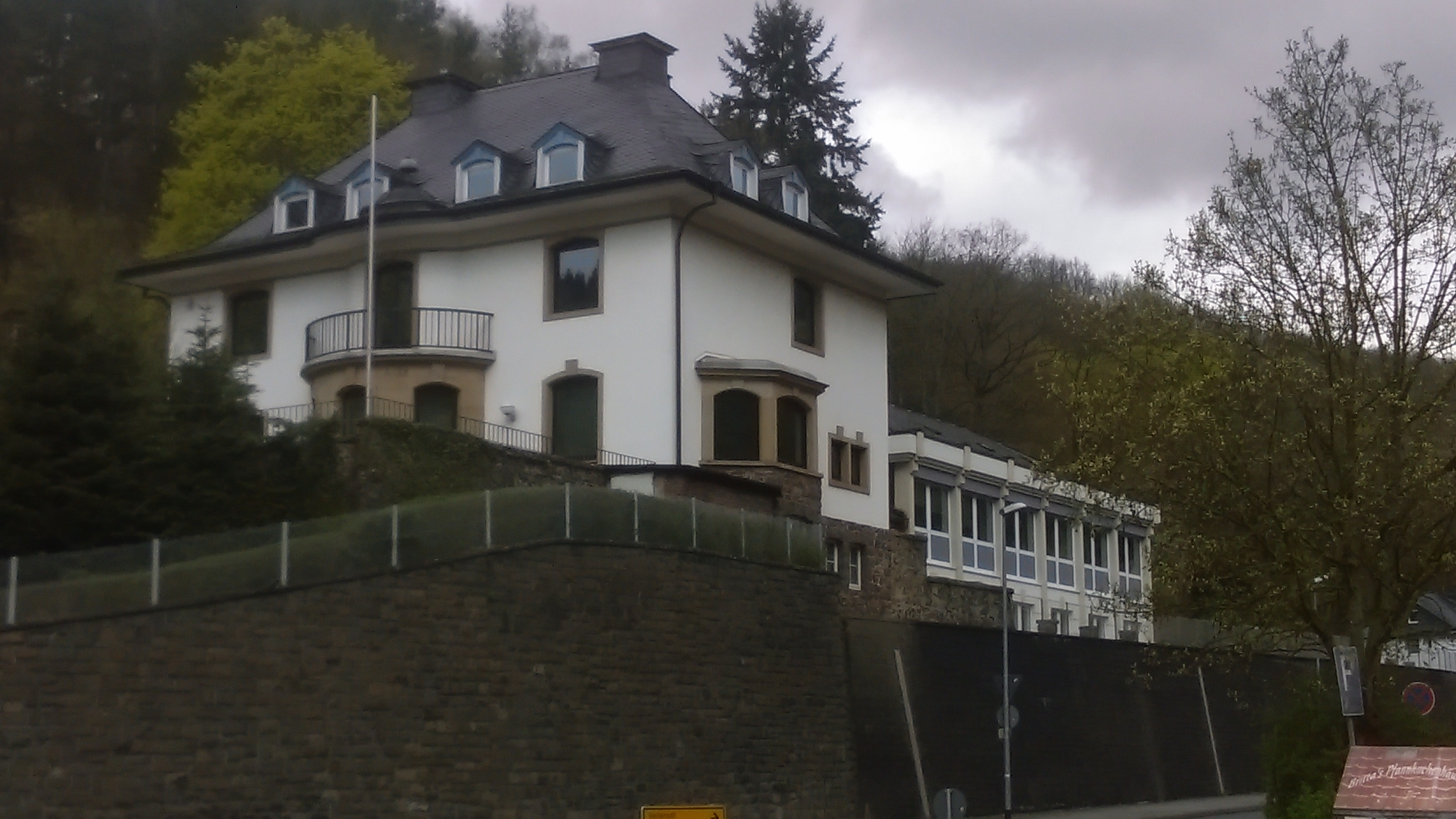 Verwaltungssitzung des Evangelischen Kirchenkreis Obere Nahe in Idar-Oberstein